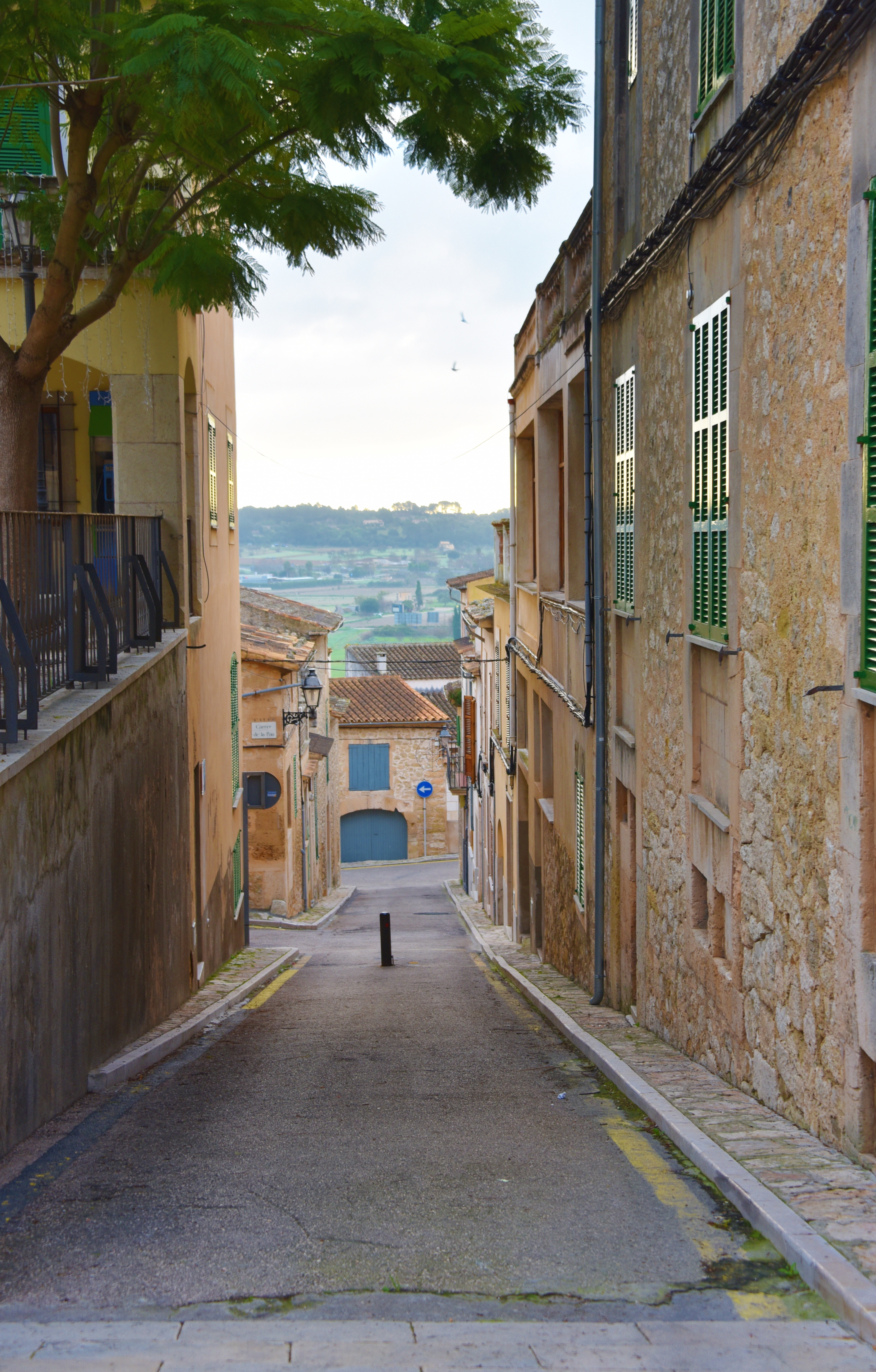 Street in Montuiri